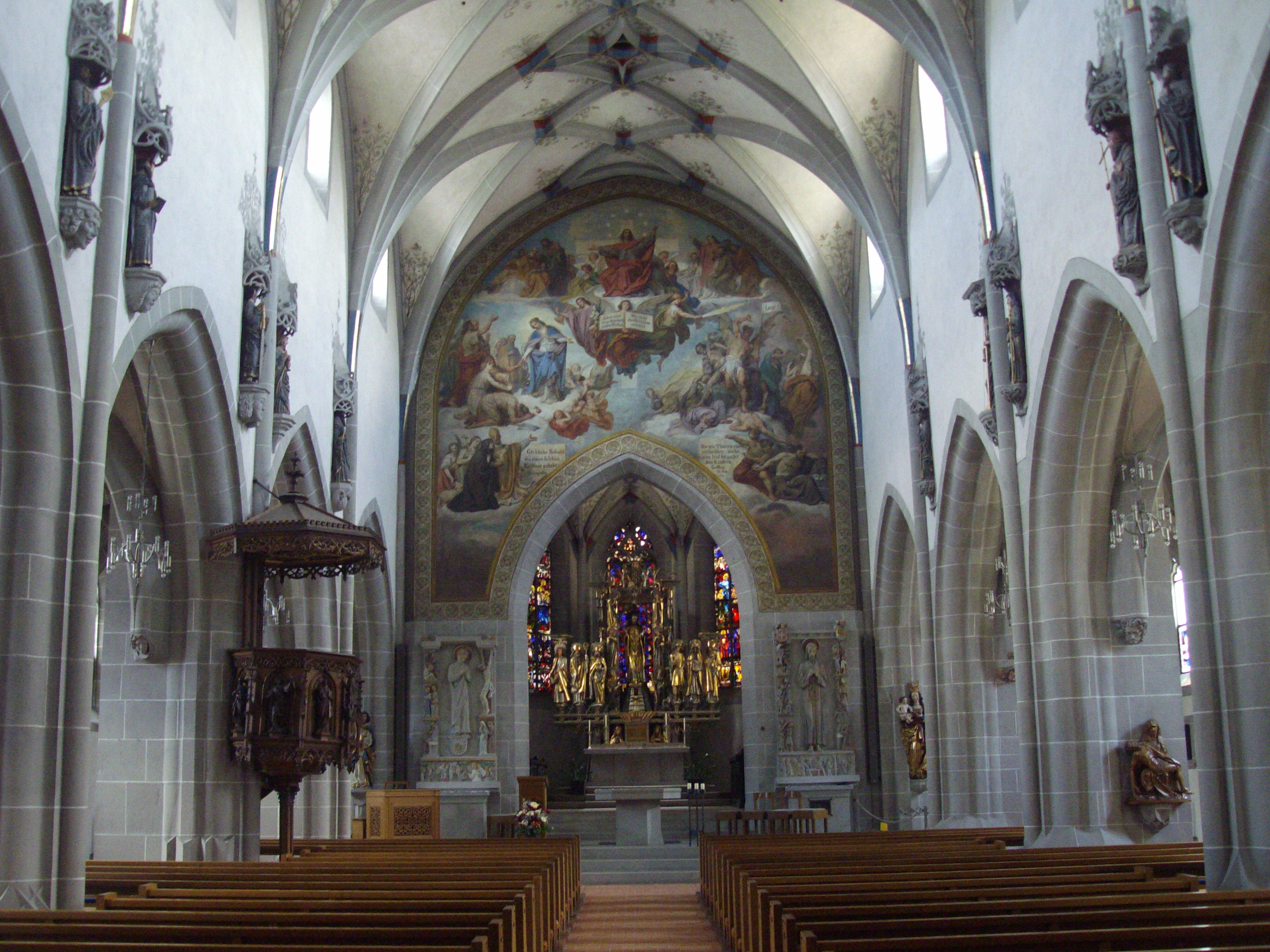 Innenraum der Kirche St. Oswald in Zug